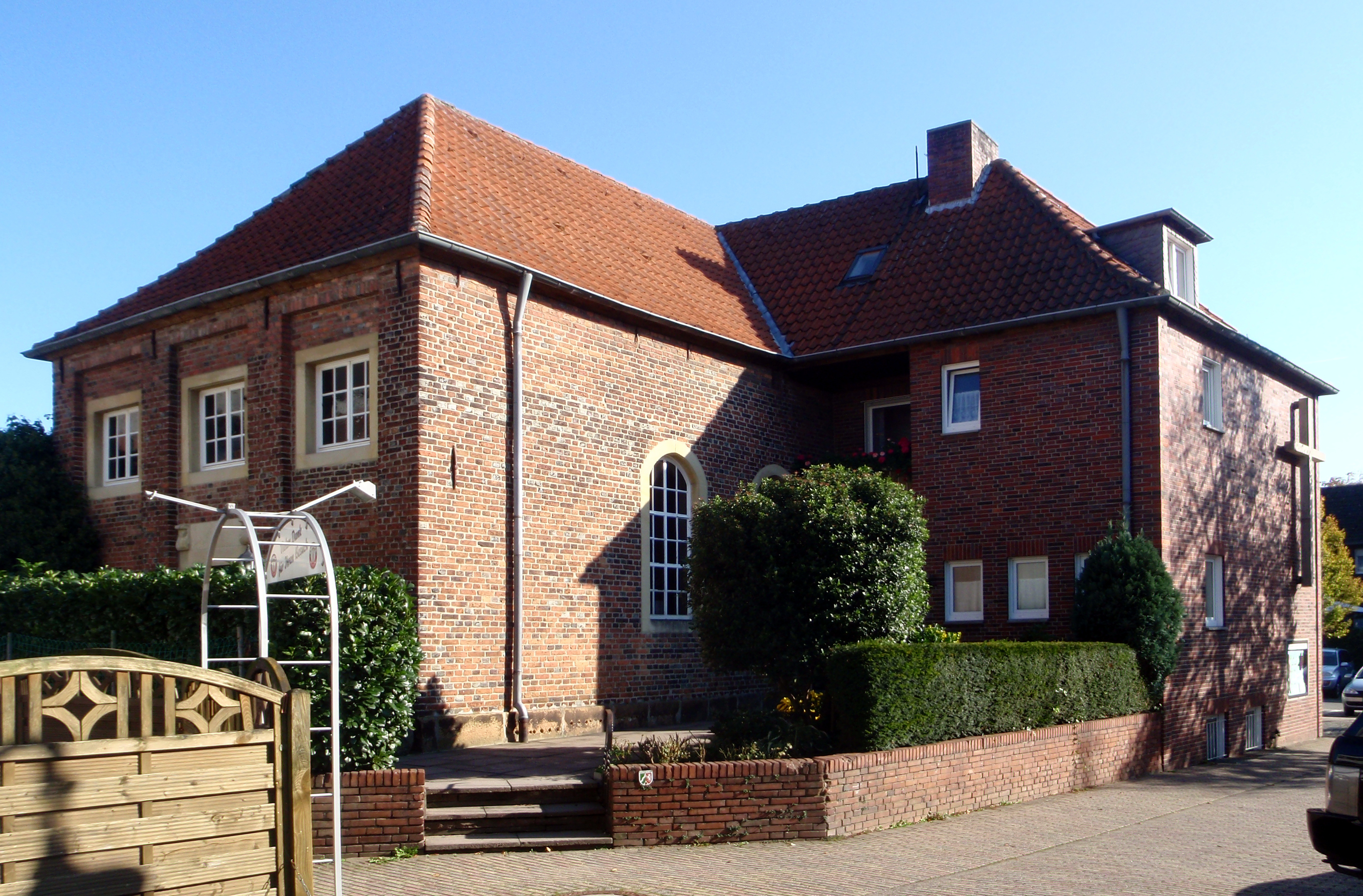 Die ehemalige Synagoge in der Weberstraße 7 in Coesfeld. Zum historischen Hintergrund siehe Die Synagoge in Coesfeld, Homepage der Evangelisch Freikirchlichen Gemeinde Coesfeld.